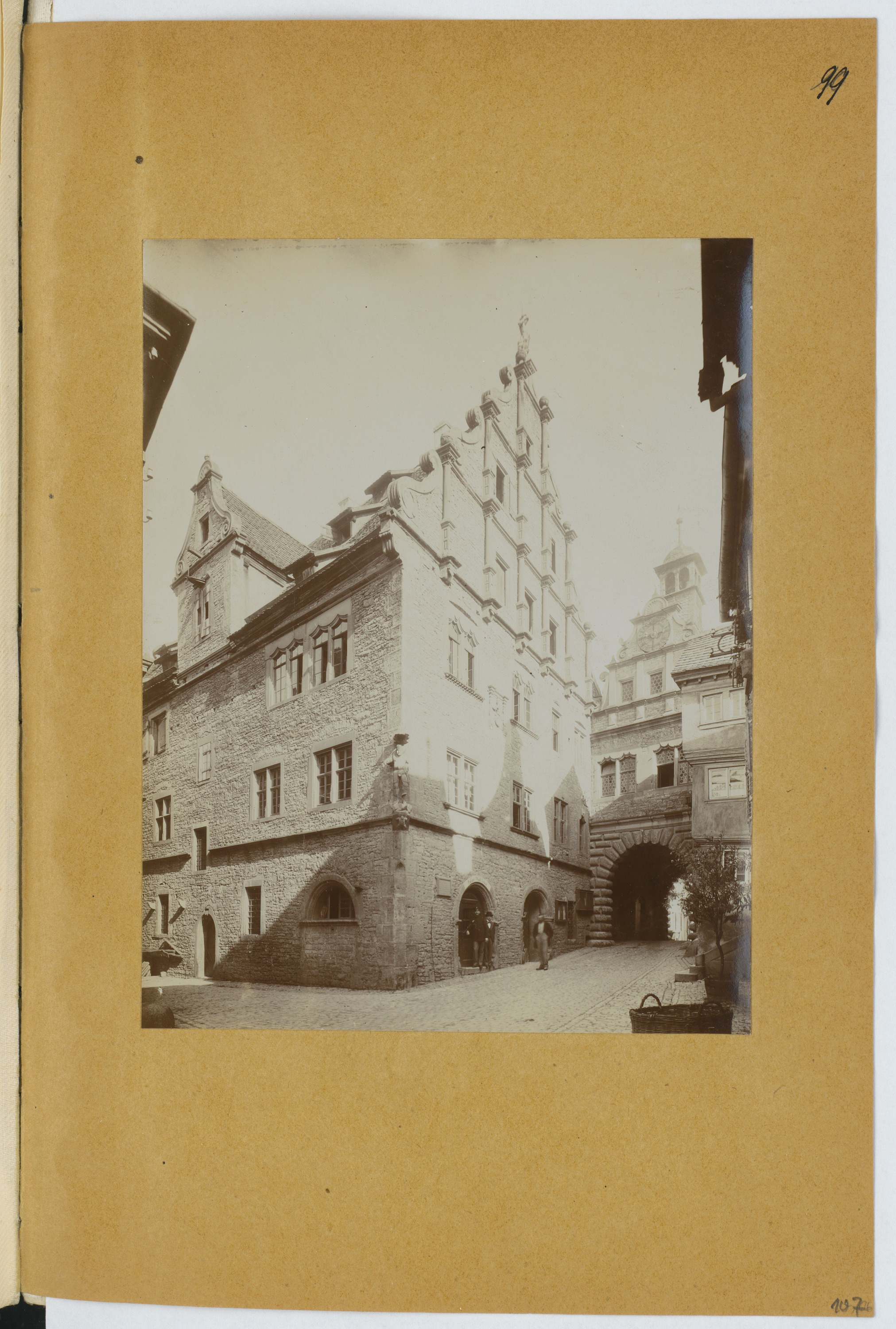 Stiehl Otto (1860-1940), Skizzen- und Fotoalbum 16: Rathaus, Marktbreit: Ansicht mit Maintor. Foto auf Papier, (inkl. Scanrand). Architekturmuseum der Technischen Universität Berlin Inv. Nr. 57201,107.